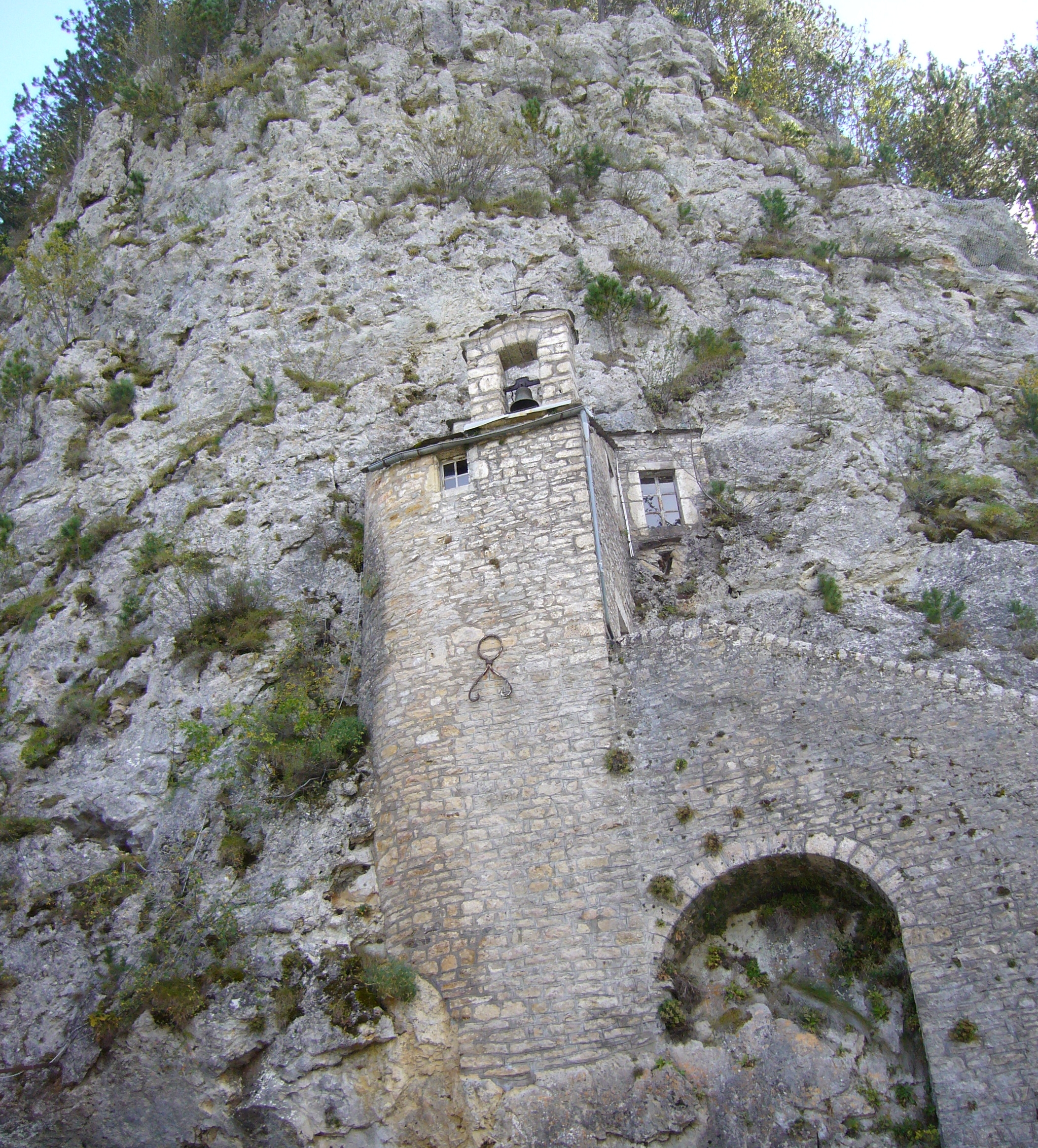 Ermitage de Saint Privat, Mende (Lozère, France)